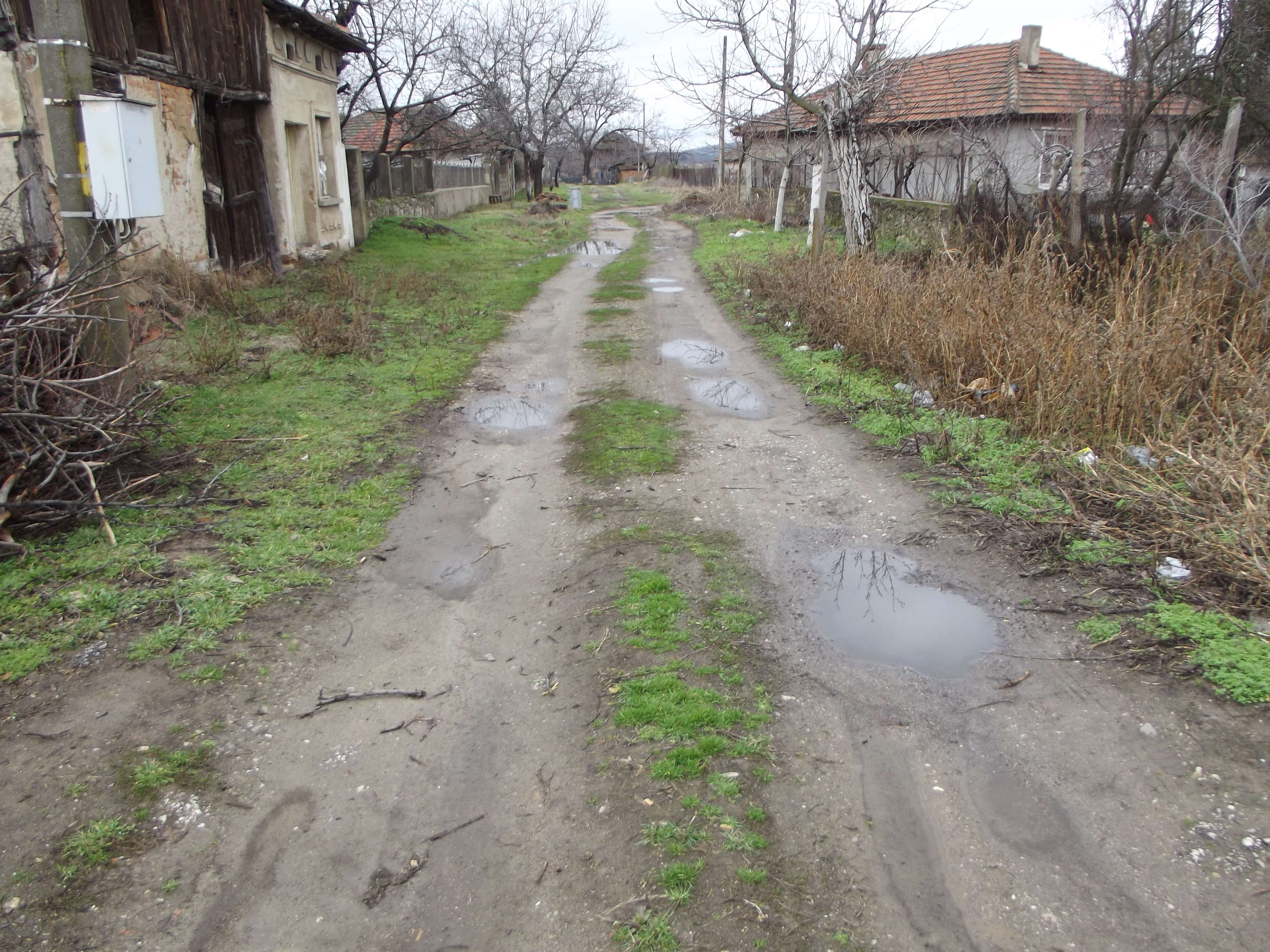 Улица Стара планина в с. Ново село, Видинско